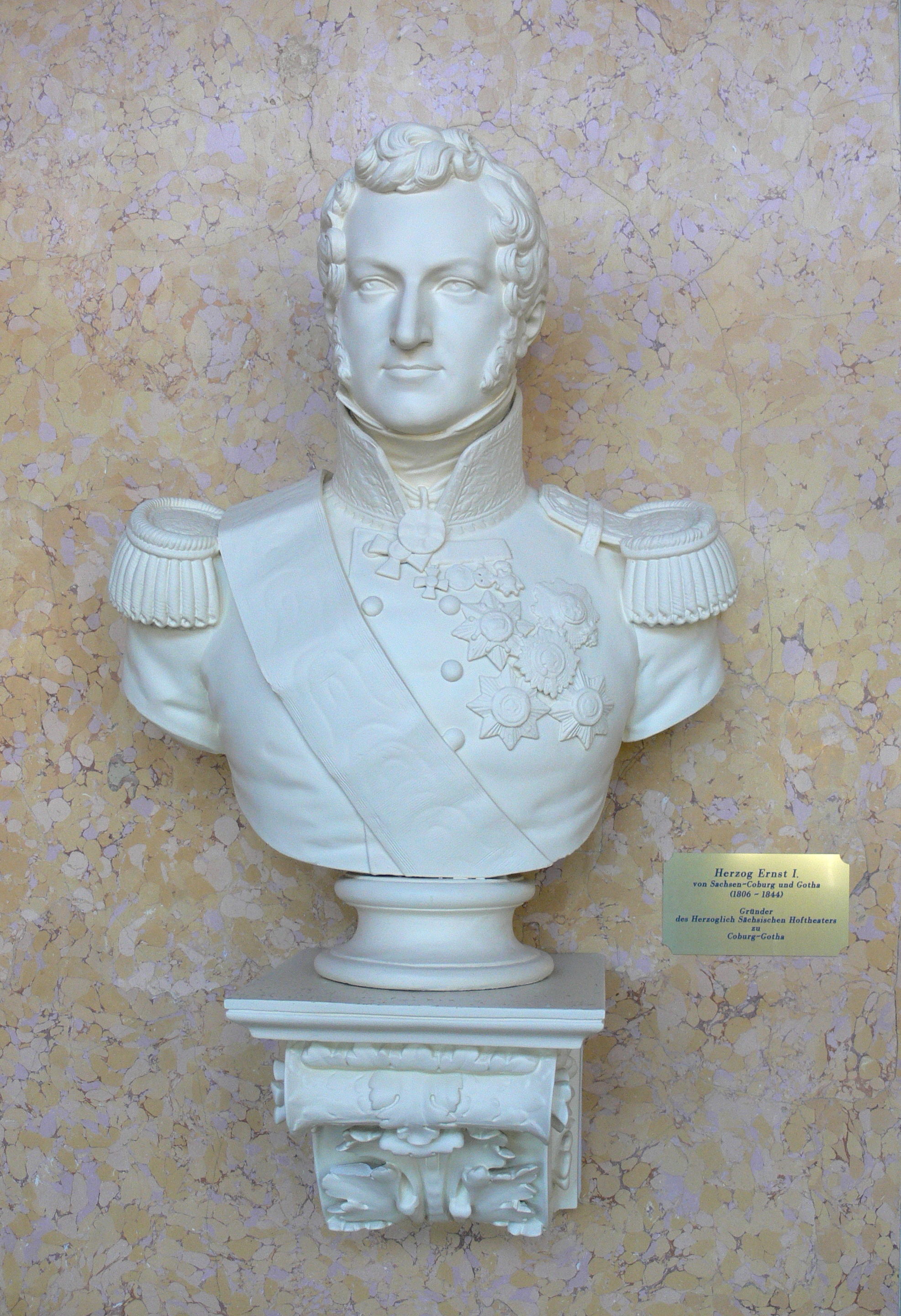 Landestheater Coburg Spiegelsaal: Büste Ernst I. von Sachsen-Coburg-Gotha